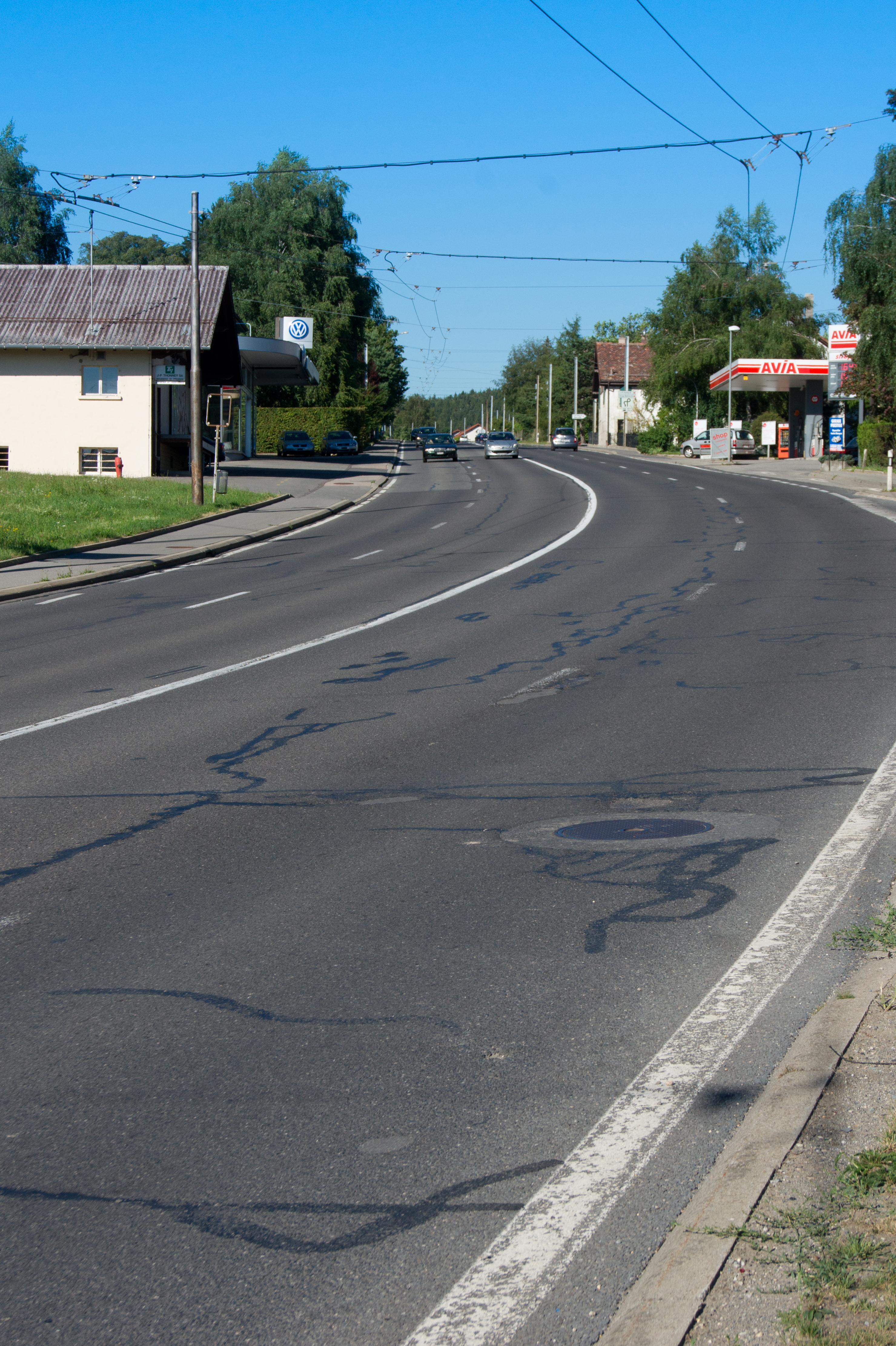 Route cantonale Berne-Lausanne à Epalinges.